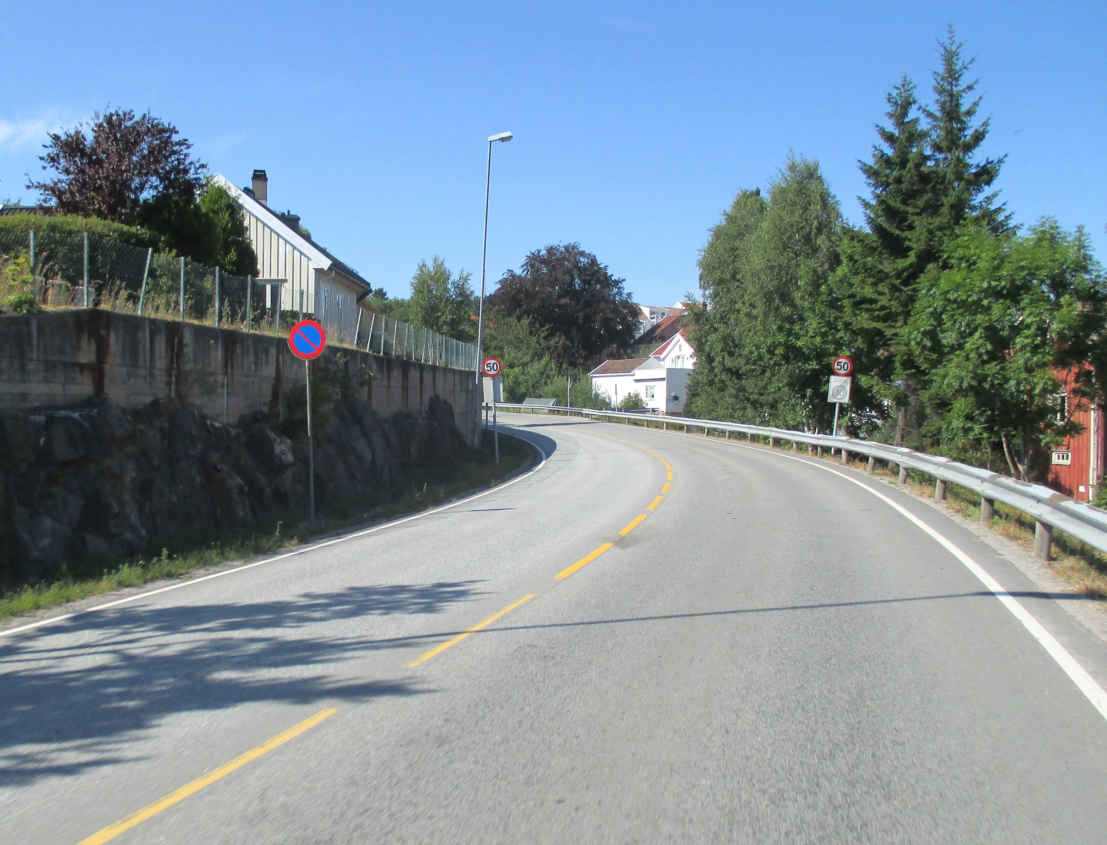 Jernbanegata i Lillesand er fylkesvei 235.